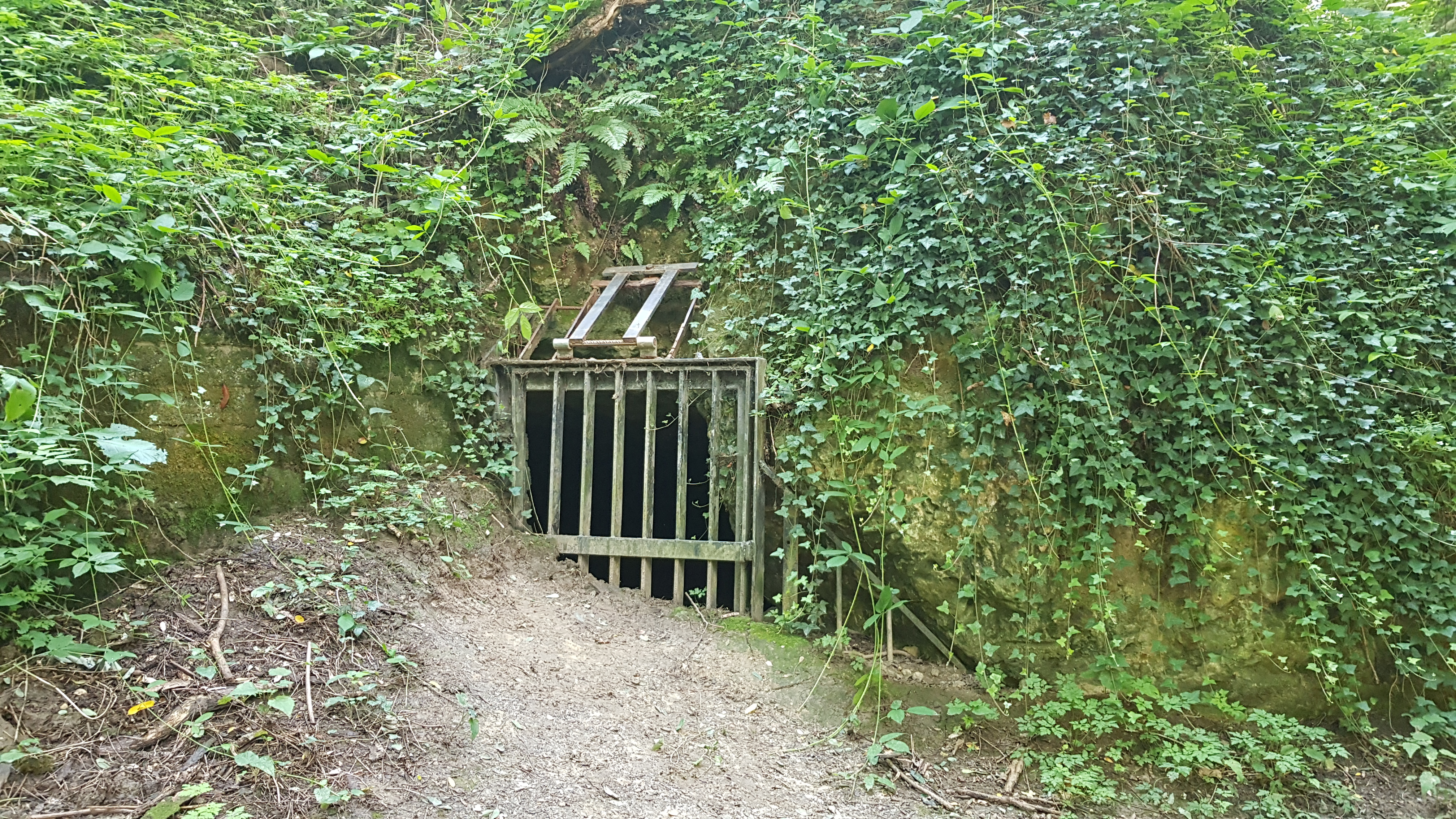 Musschenputgroeve, Geulhem, Nederland